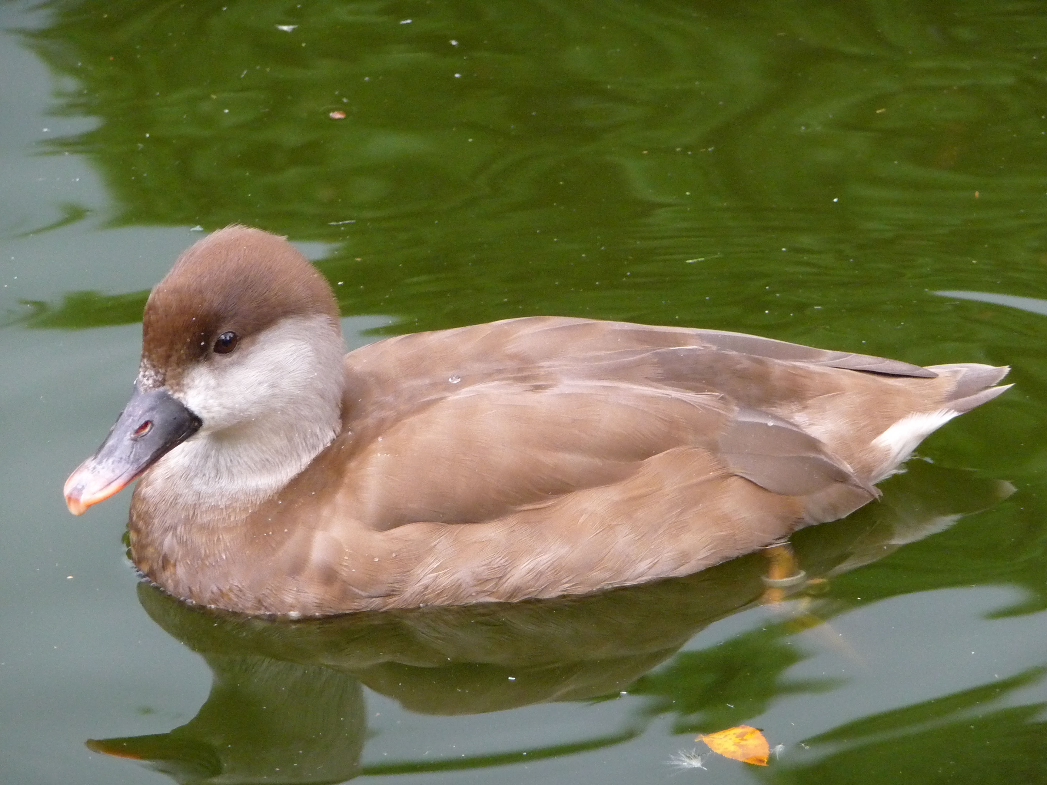 Weibliche Kolbenente (Netta rufina)